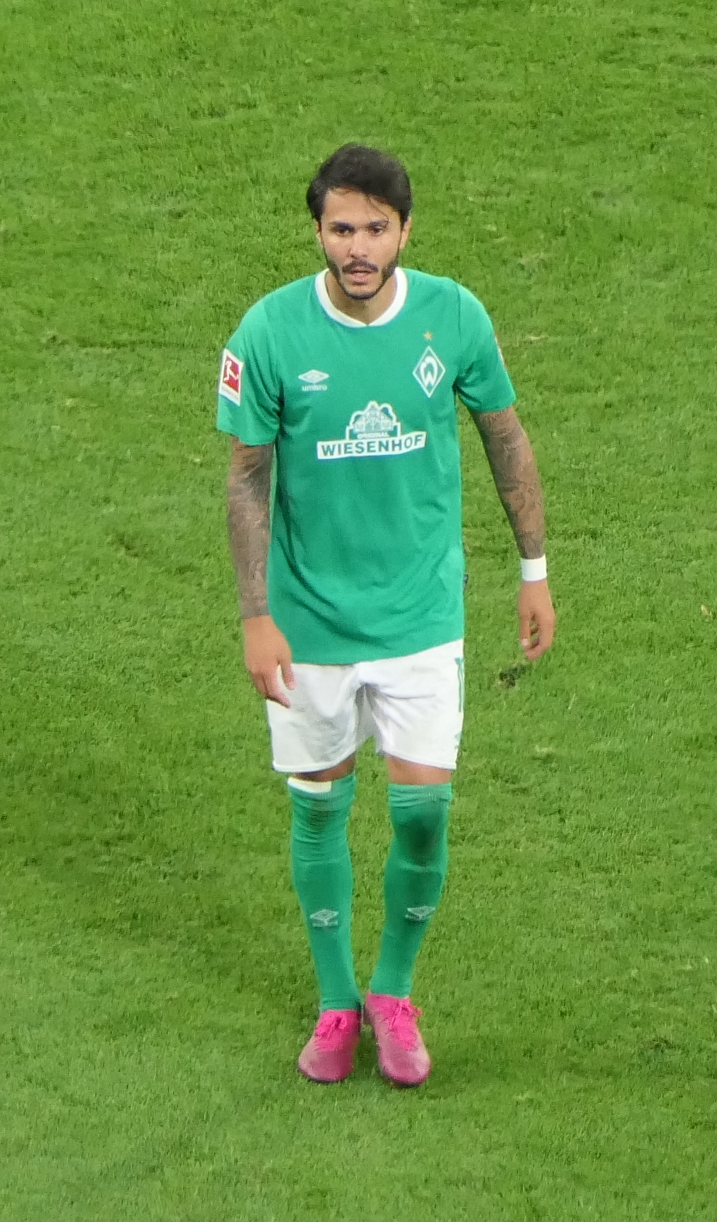 Der Fussballprofi Leonardo Bittencourt im Trikot vom SV Werder Bremen beim Auswärtsspiel gegen Borussia Dortmund am 28.09.2019.